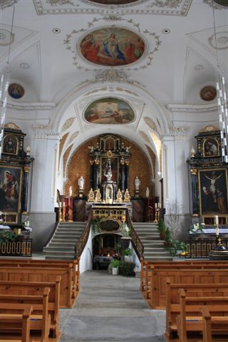 Innenraum der röm.-kath. Kirche Beinwil (Freiamt), Aaragu, Schweiz